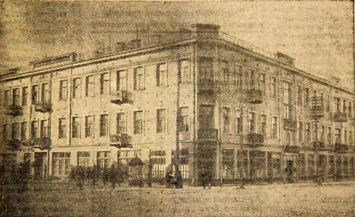 Беларуская (тарашкевіца): Менск (Miensk), вуліца Захараўская (vulica Zacharaŭskaja) каля скрыжаваньня з Лошыцкай (vulica Łošyckaja)